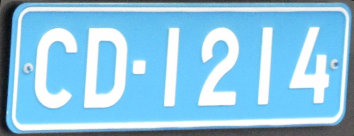 Finland kentekenplaat diplomatiek